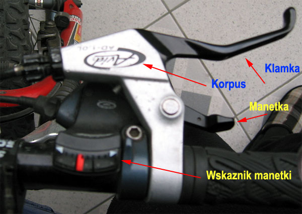 Klamka i manetka typu E-Z rowerowa - zdjecie wlasne